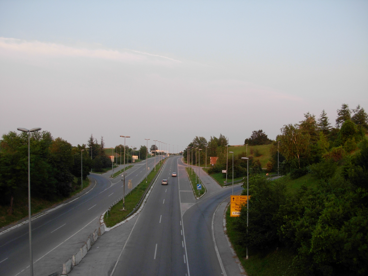 Mišeluk, slikano iznad ulaza u tunel.